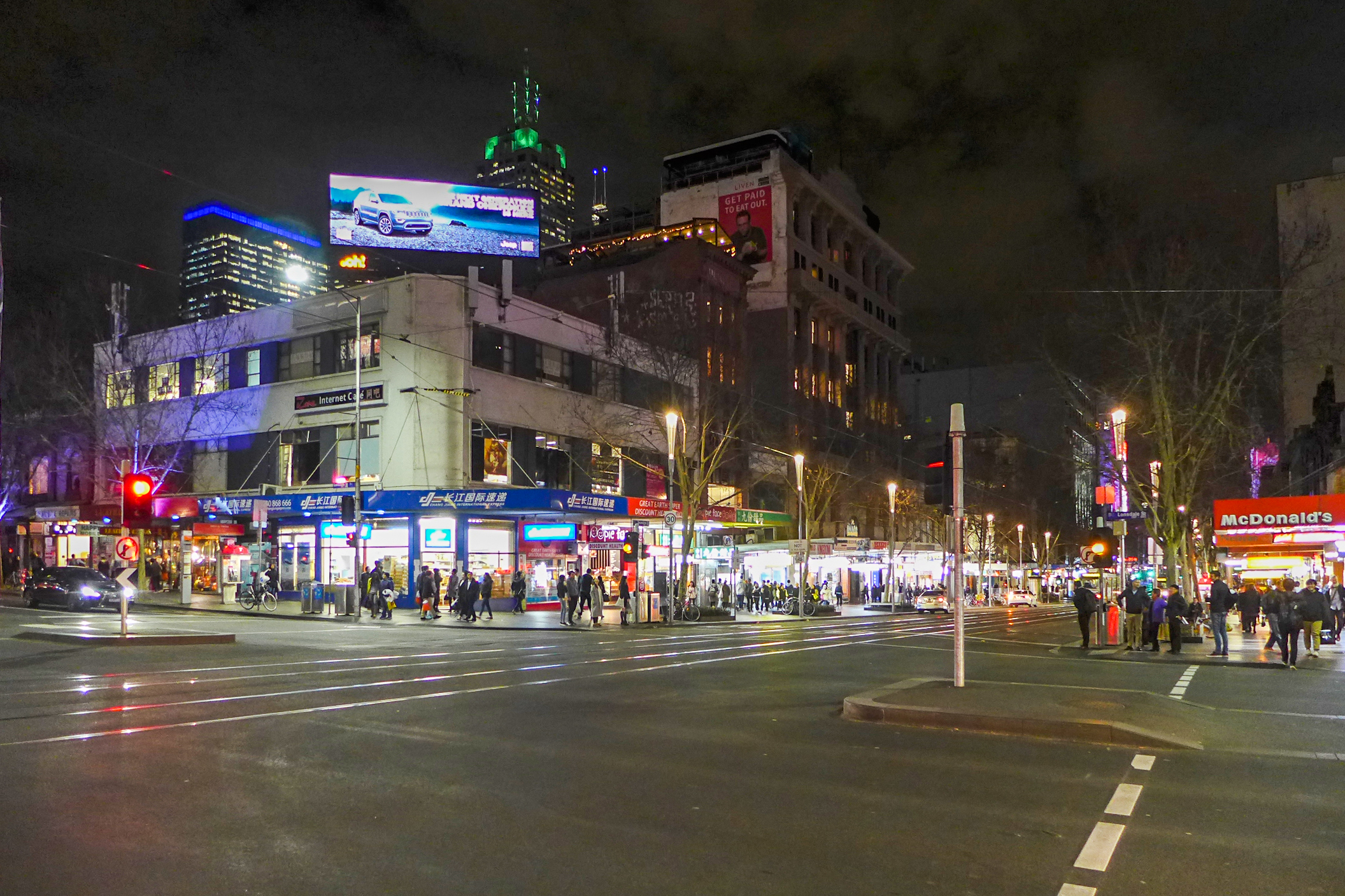 Lonsdale Street, Melbourne CBD